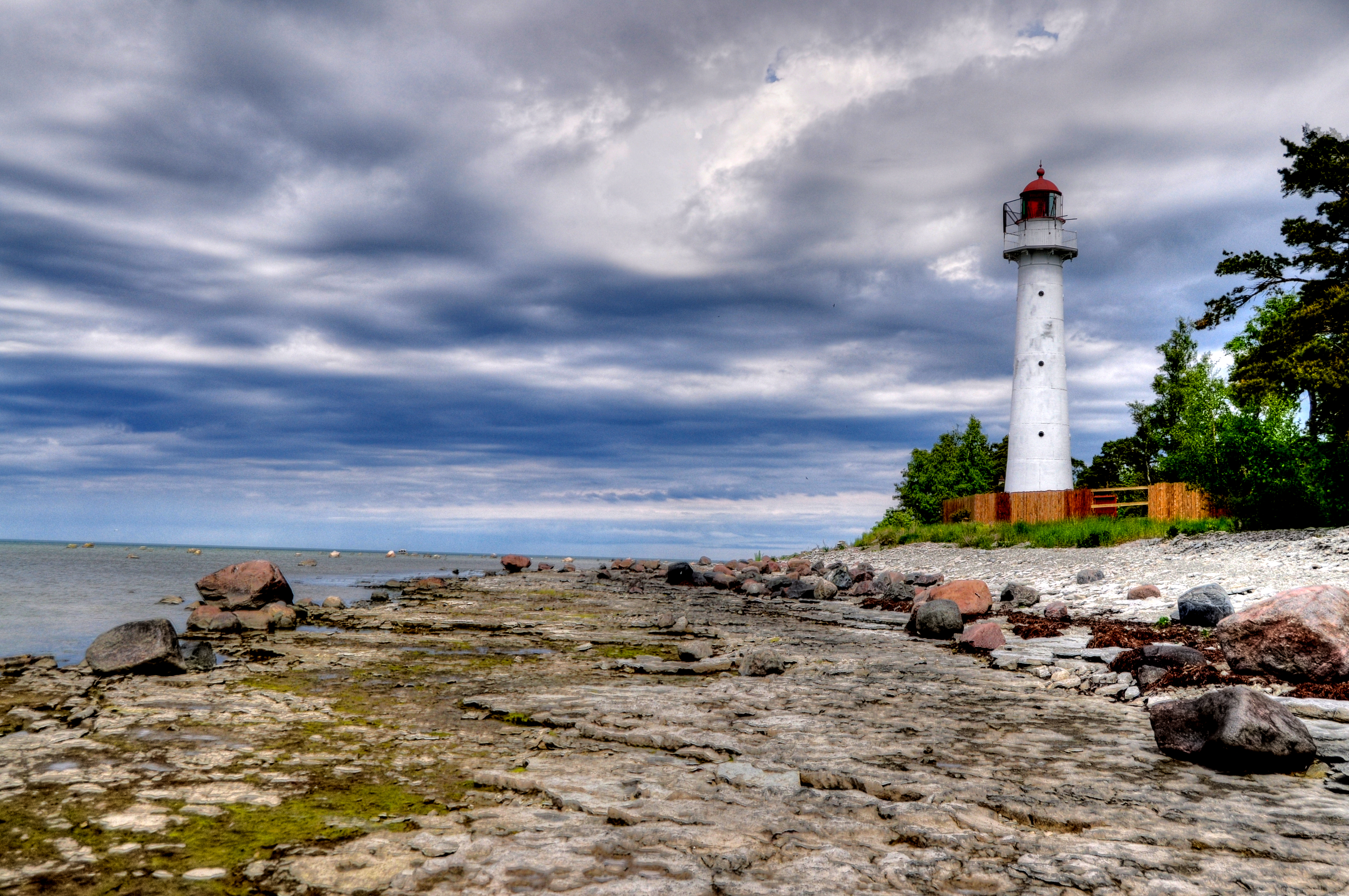 Vormsi saarel Saxby küla juures asuv majakas. Pilt on HDR